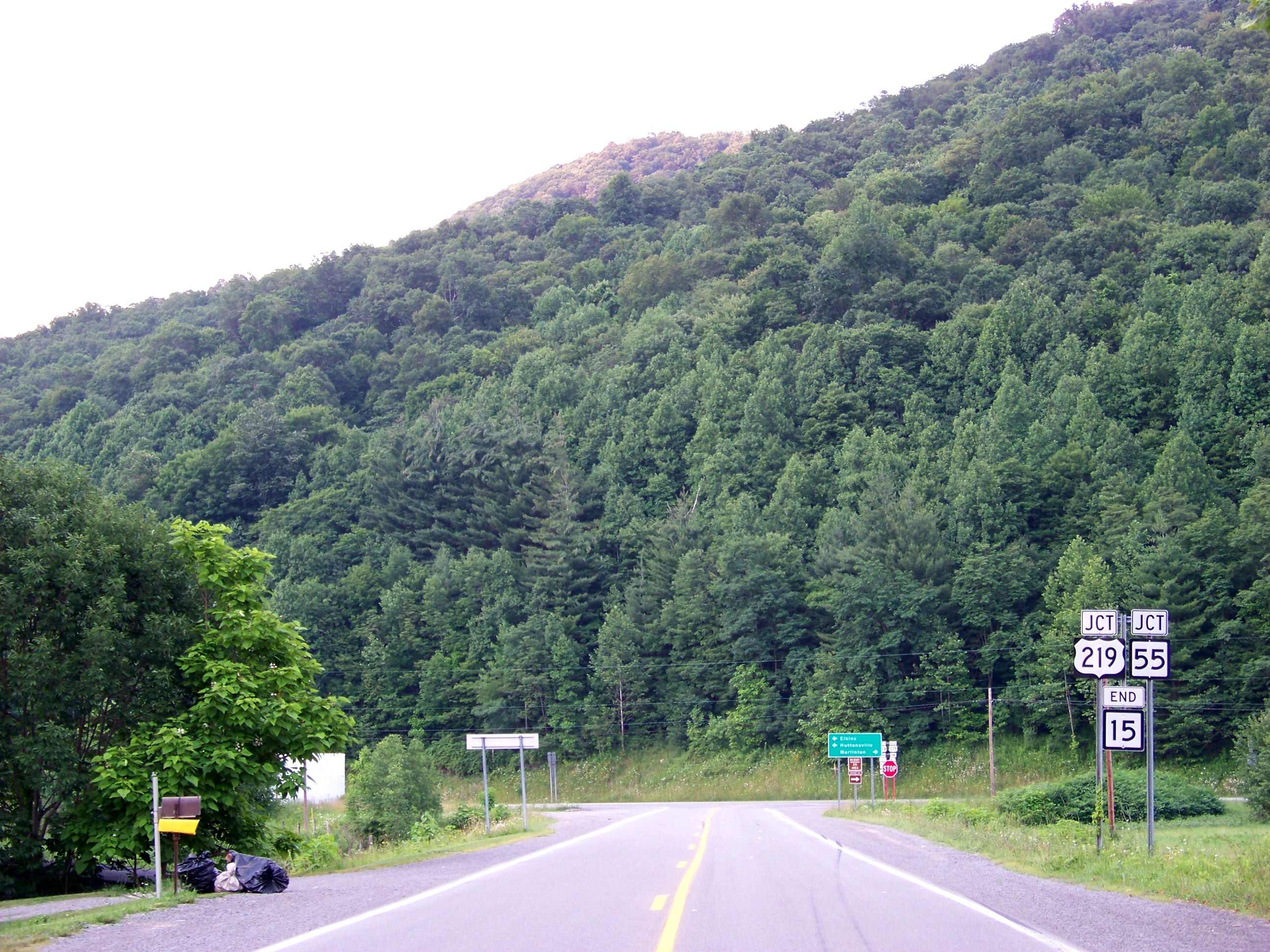 Mingo, WV, USA